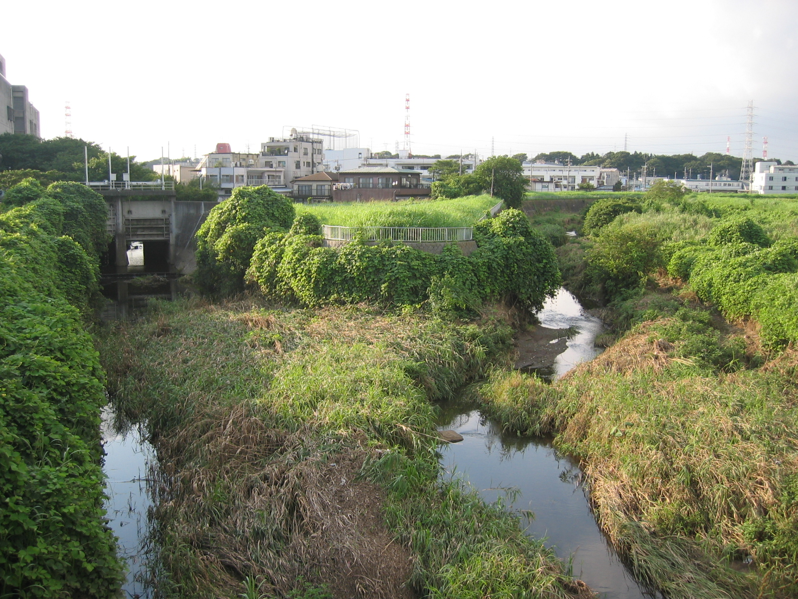 2006年8月21日、利用者自身の撮影。